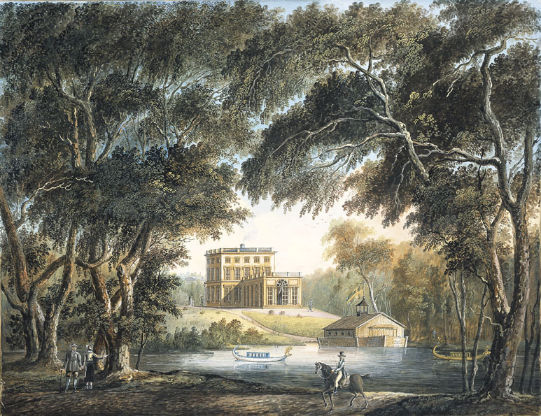 Hagaparken och Gustav III Paviljong, målning 1811